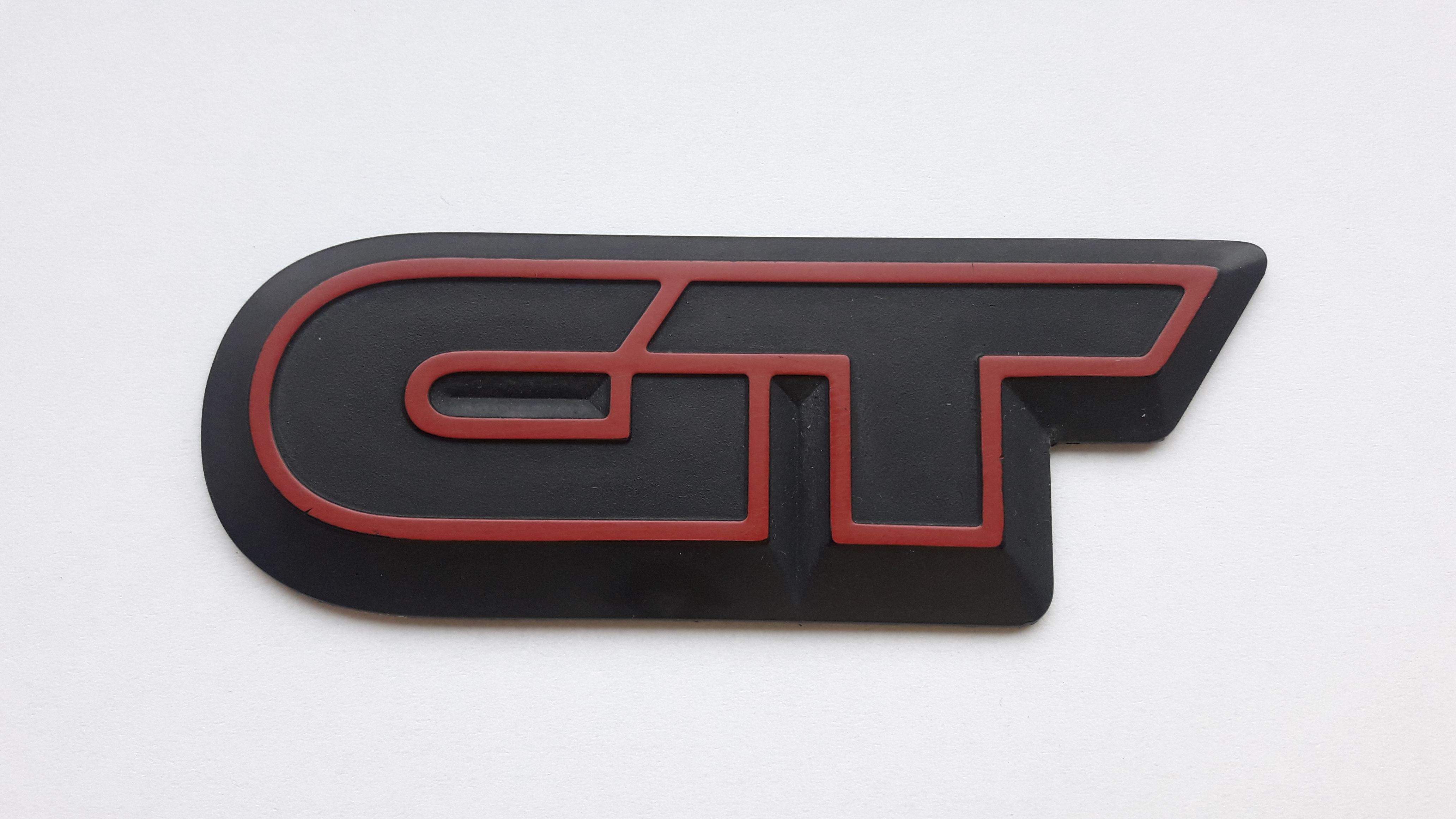 samsung